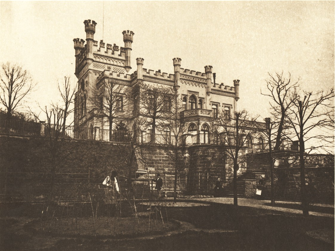 Villa Orlando in Loschwitz bei Dresden